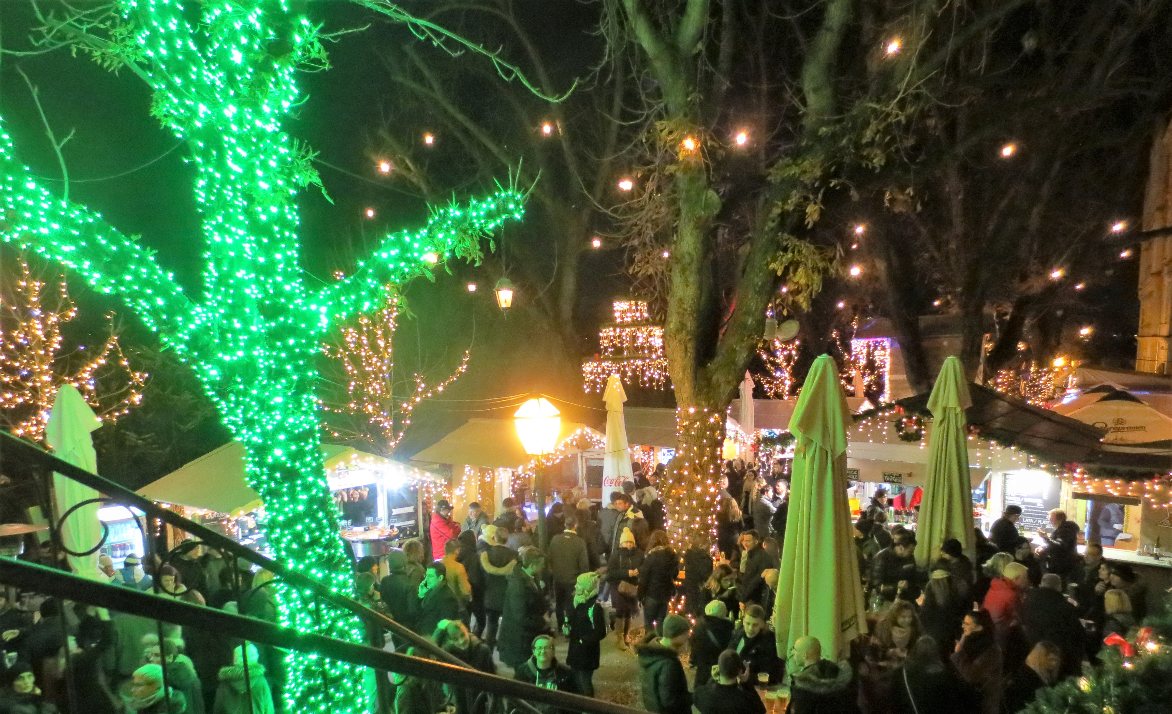 Božični sejem v Zagrebu 2018